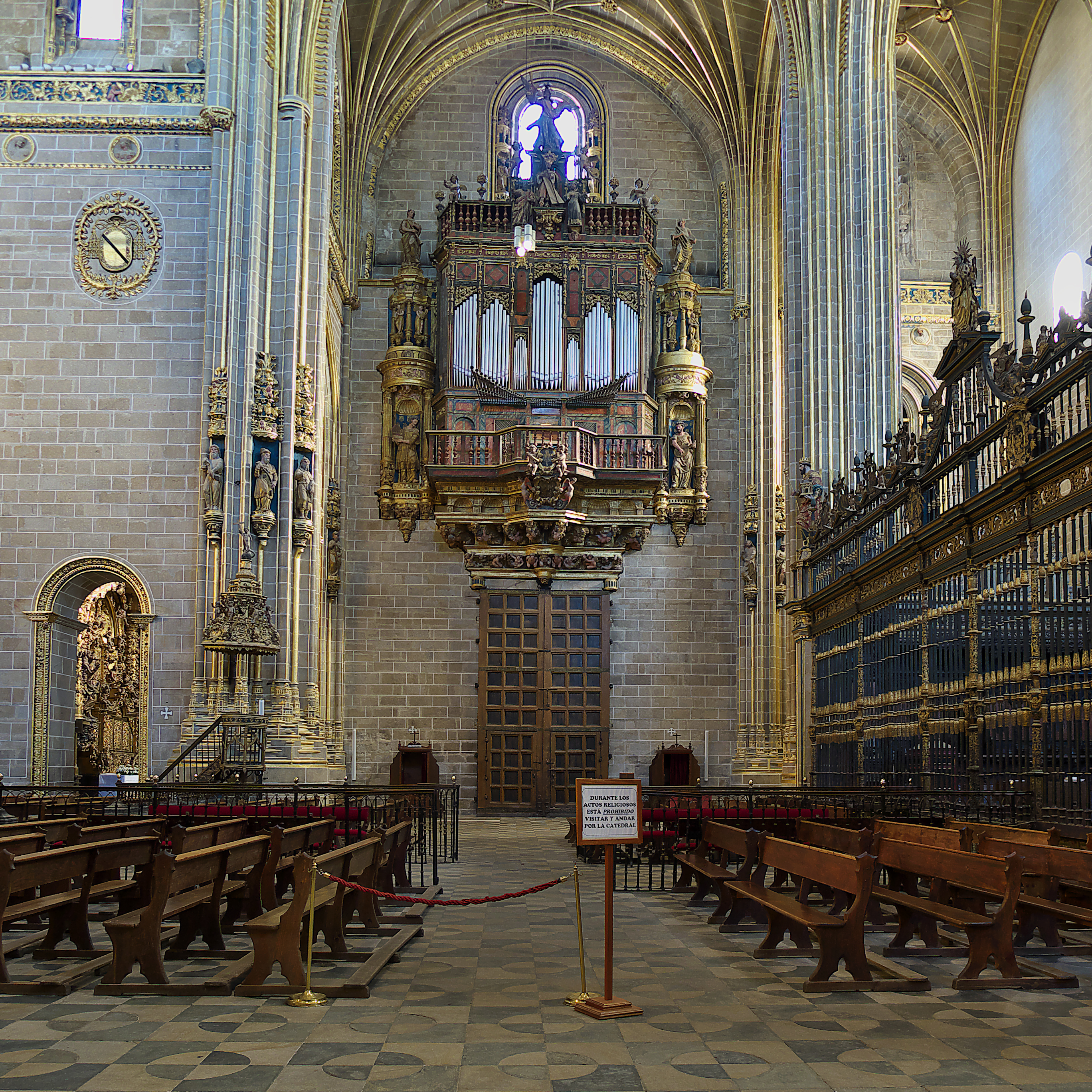 Catedral de la Asunción de la Santísima Virgen, Plasencia. Importante órgano romántico (1692-1695), proyectado por el famoso maestro franciscano, Fray Domingo de Aguirre. Su iconografía y simbolismo, muy interesante.